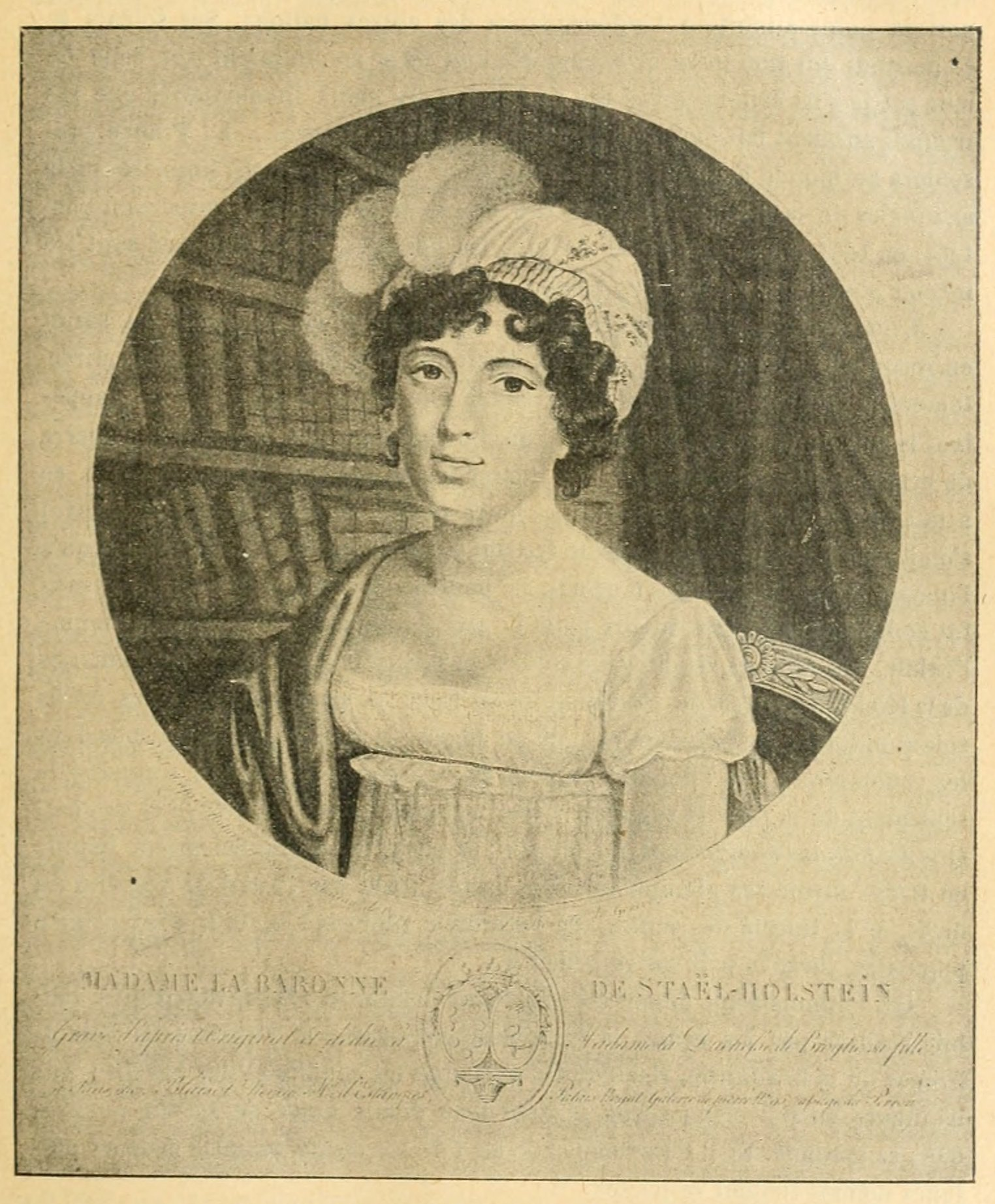 Illustration page 885 du volume II de l'ouvrage Histoire socialiste File:Jaurès - Histoire socialiste, II.djvu. Madame de Stael.